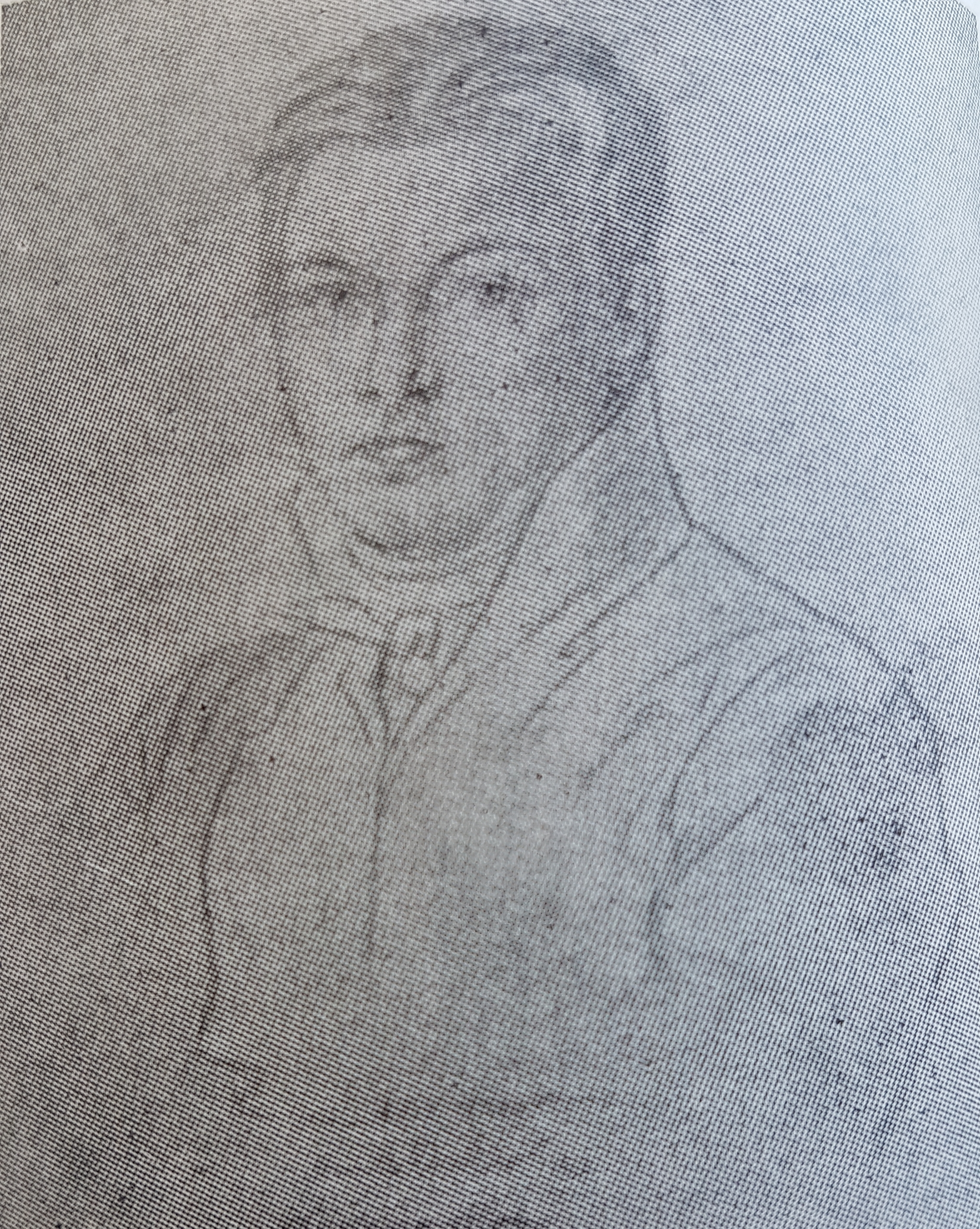 Gustaf Hasselgren (Erik) tecknad av Rudolf Suhrlandt, avfotograferad porträttbild från Allhems Svenskt konstnärslexikon.